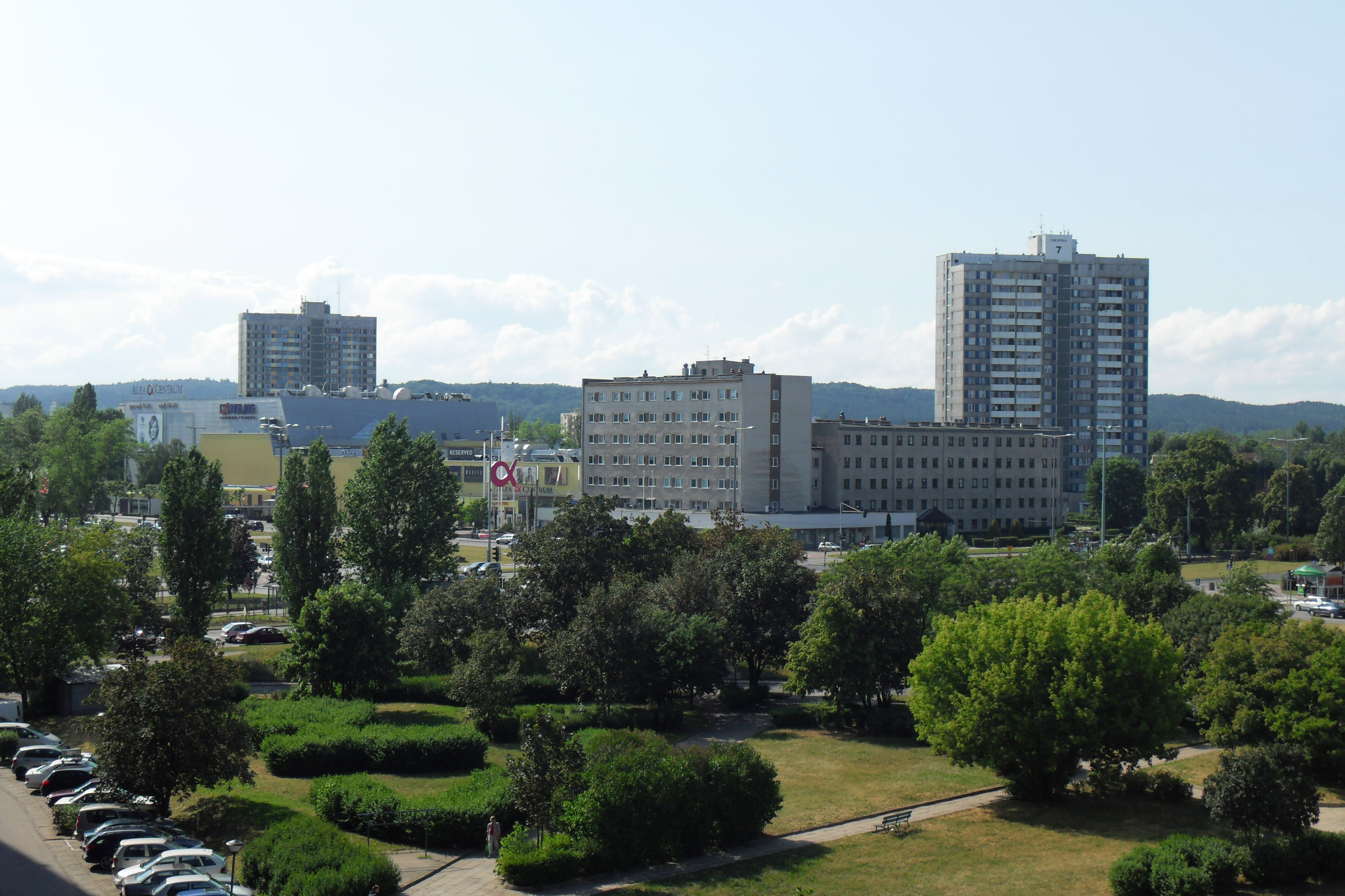 Gdańsk Przymorze.